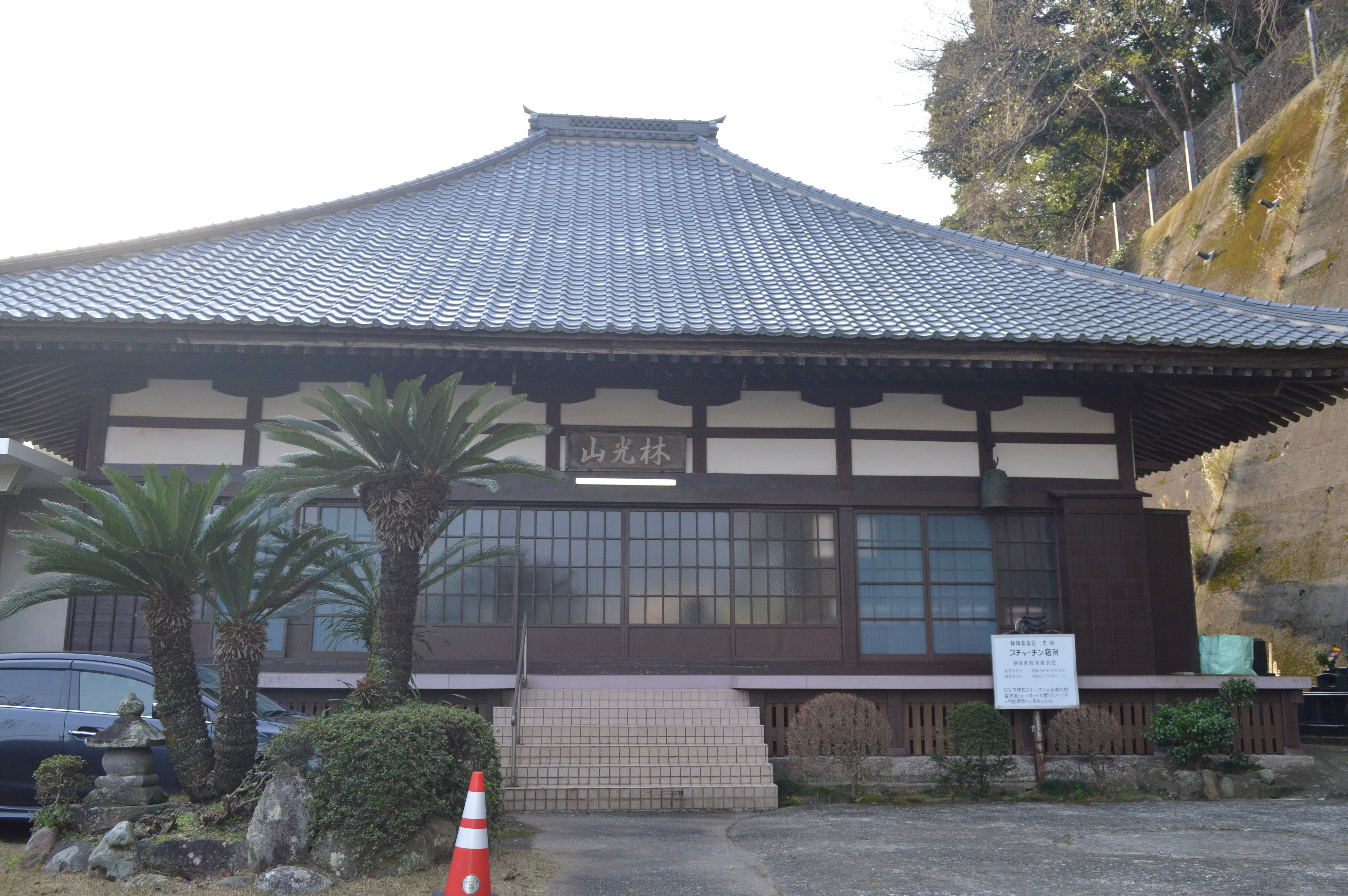 静岡県沼津市戸田にある宝泉寺。